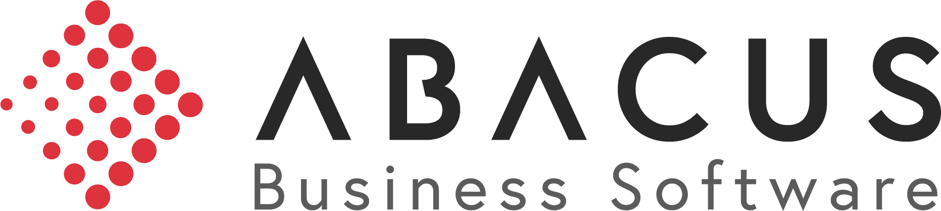 Bild